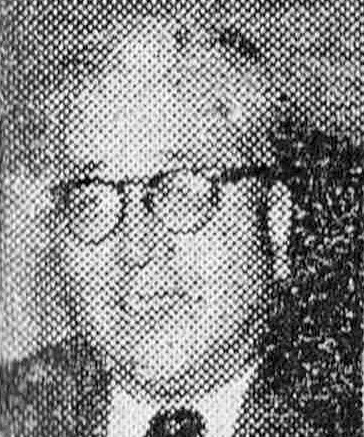 城戸四郎 （Shiro Kido）